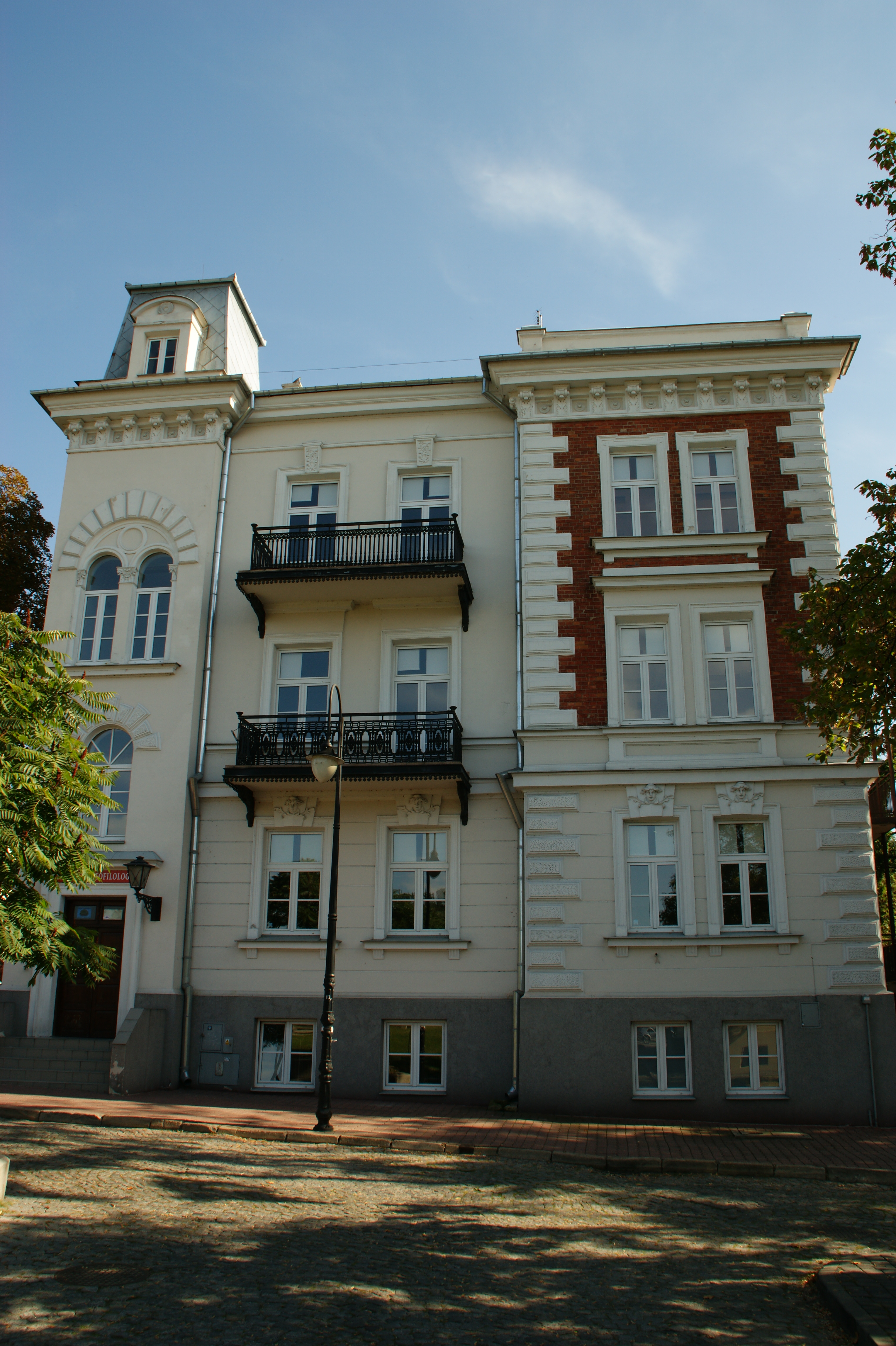 Płock, ul. Kościuszki 20 - dom, mur., 1906, obecnie wydział neofilologii PWSZ (zabytek nr 605 z 11.01.1989)